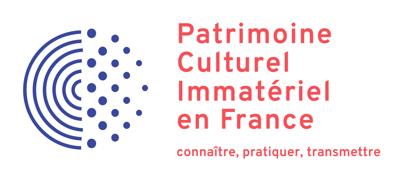 Le logotype du ministère de la culture sera utilisé en association directe avec l’intitulé des éléments tels qu’ils apparaissent dans l’Inventaire national du Patrimoine culturel immatériel : culturel-immateriel